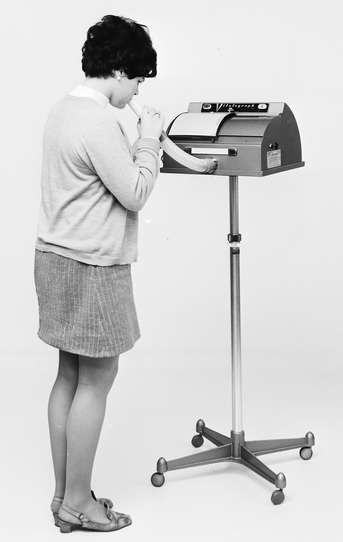 kvinne, spirometer, Vitalograph. Bildet viser et apparat til å måle lungekapasitet, også kalt spirometer. Når en blåser i slangen, tegner instrumentet en kurve som viser kraften i utblåsningen.